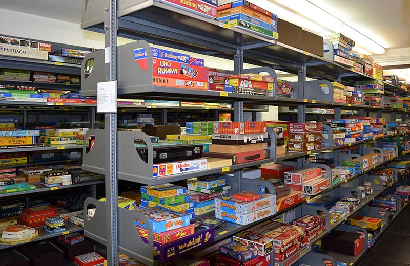 Nürnberg, Pellerhaus, Archivraum des Deutschen Spielearchivs Nürnberg